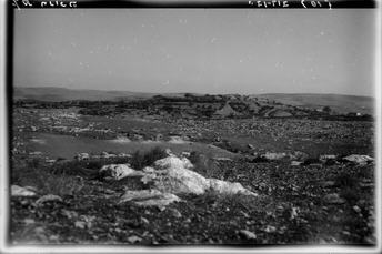 מודיעין - מבצר החשמונאים